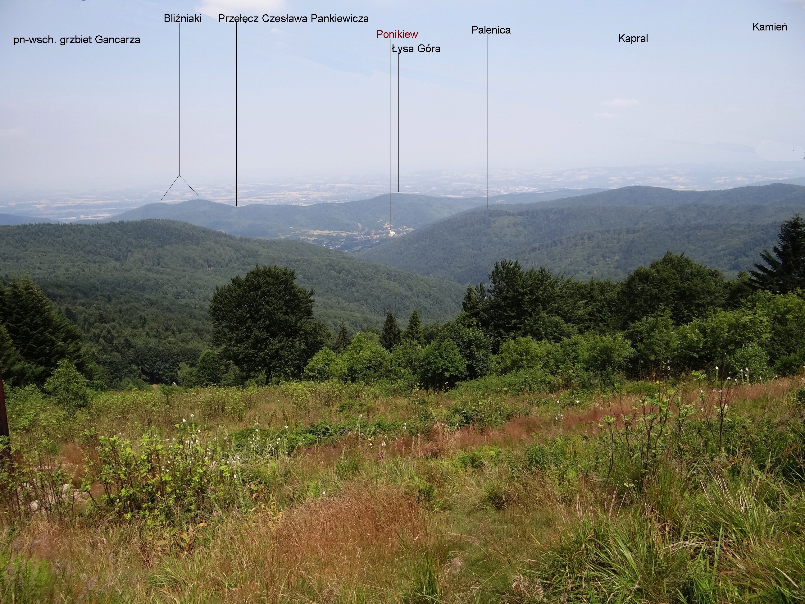 Widok z poloany Beskid na Groniu Jana Pawła II